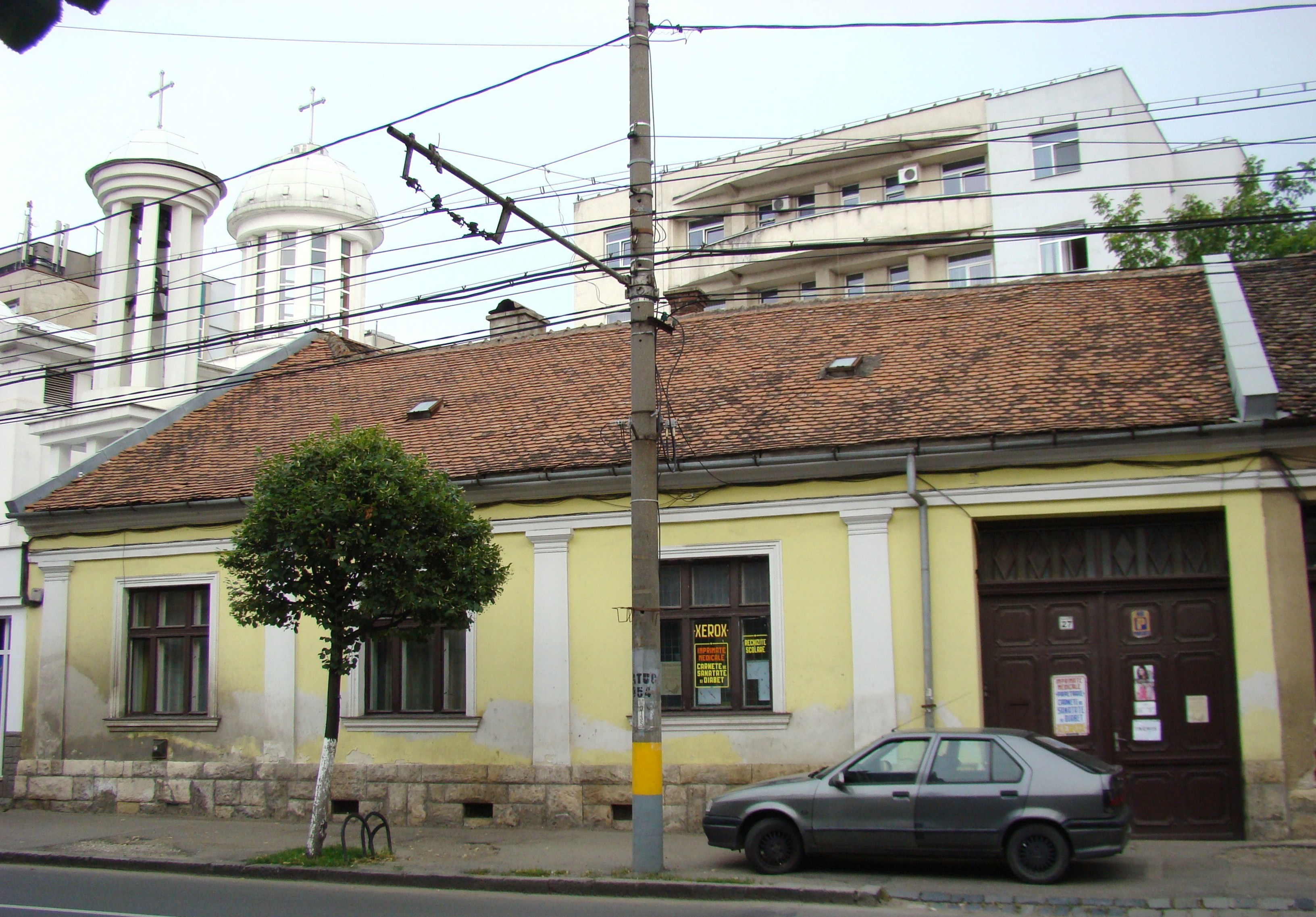 Clădire monument istoric, Calea Moților, nr. 27